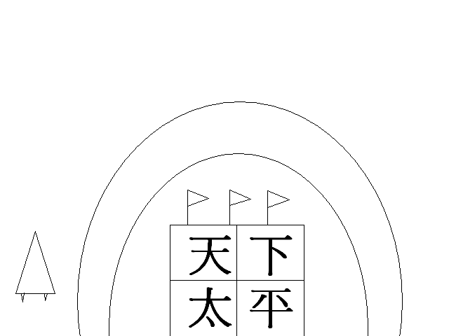 「天下太平」紙上遊戲，本人以「小畫家」繪製。 {